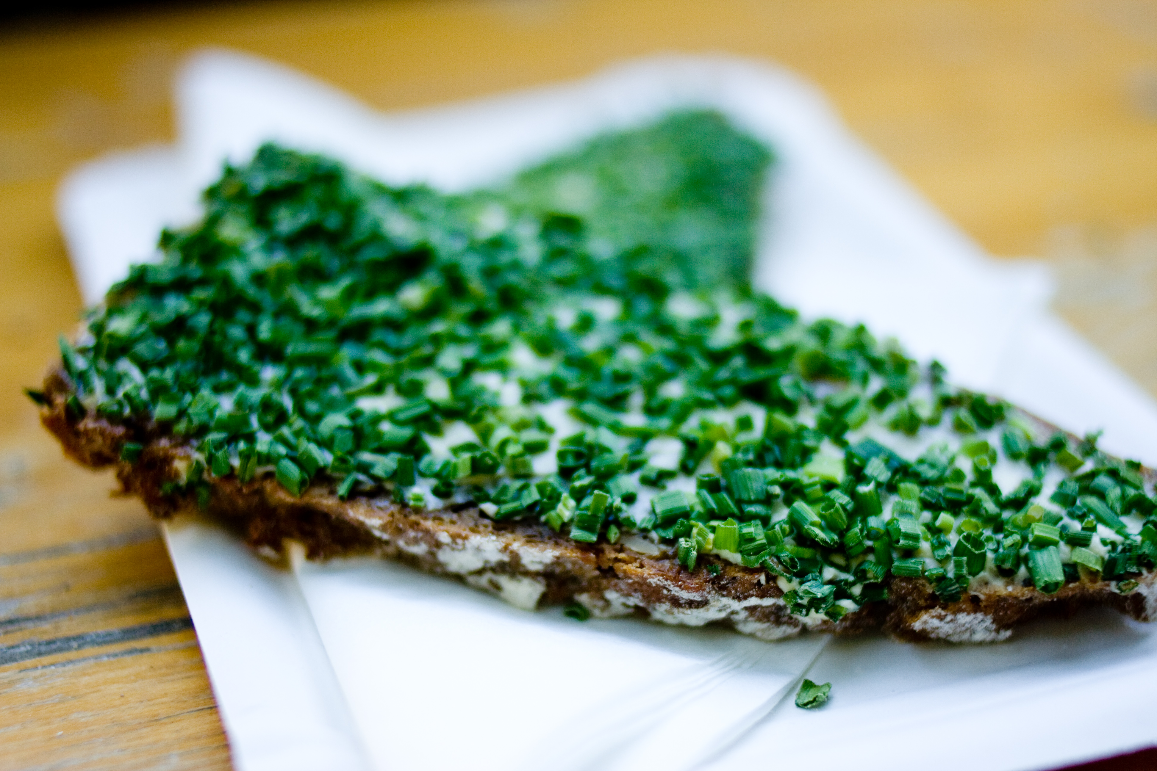 Ein Schnittlauchbrot (bestehend aus Waldbauernflade, Bauernbutter, Bio-Schnittlauch).